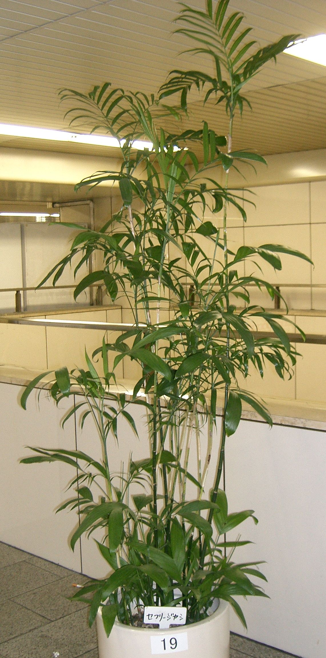 Chamaedorea seifrizii